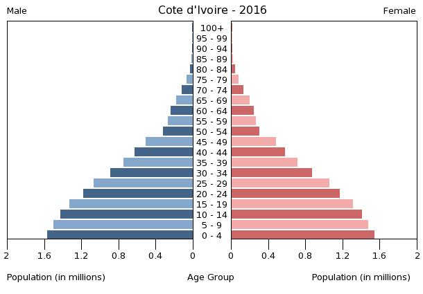 A population pyramid illustrates the age and sex structure of a country's population and may provide insights about political and social stability, as well as economic development. The population is distributed along the horizontal axis, with males shown on the left and females on the right. The male and female populations are broken down into 5-year age groups represented as horizontal bars along the vertical axis, with the youngest age groups at the bottom and the oldest at the top. The shape of the population pyramid gradually evolves over time based on fertility, mortality, and international migration trends.